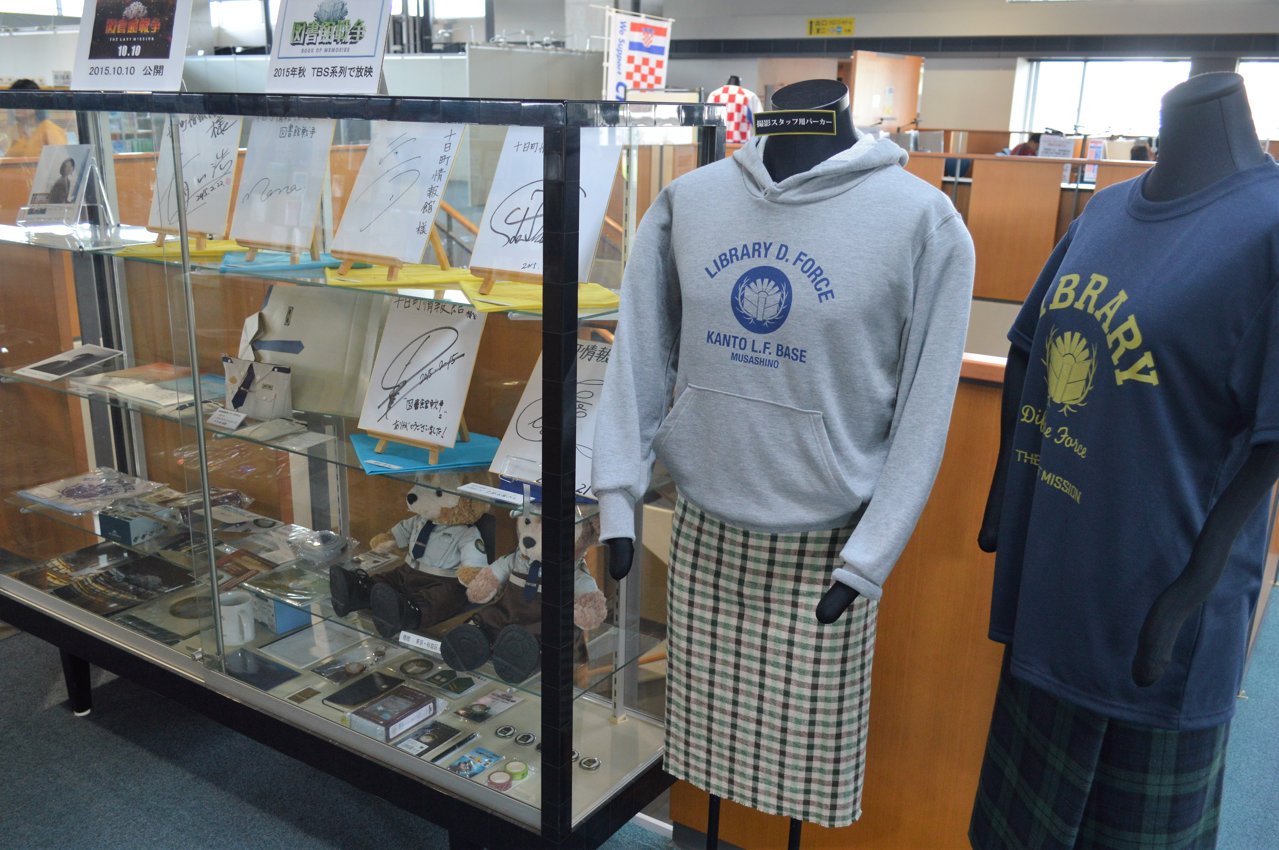 新潟県十日町市の十日町情報館。『図書館戦争』関連コーナー。